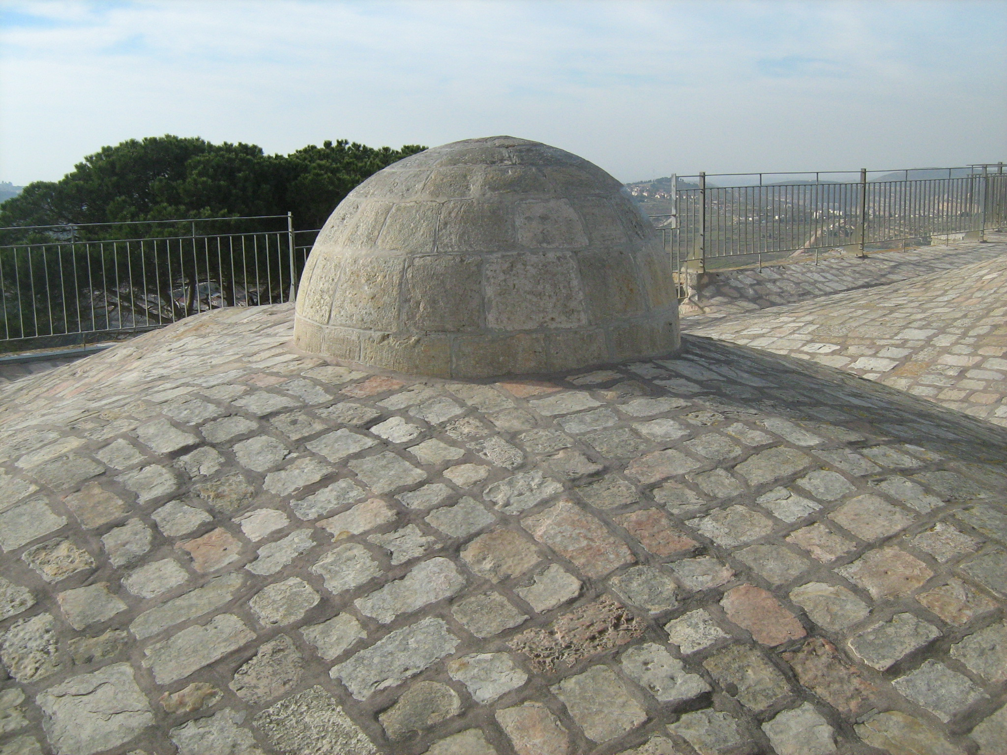 נבי סמואל